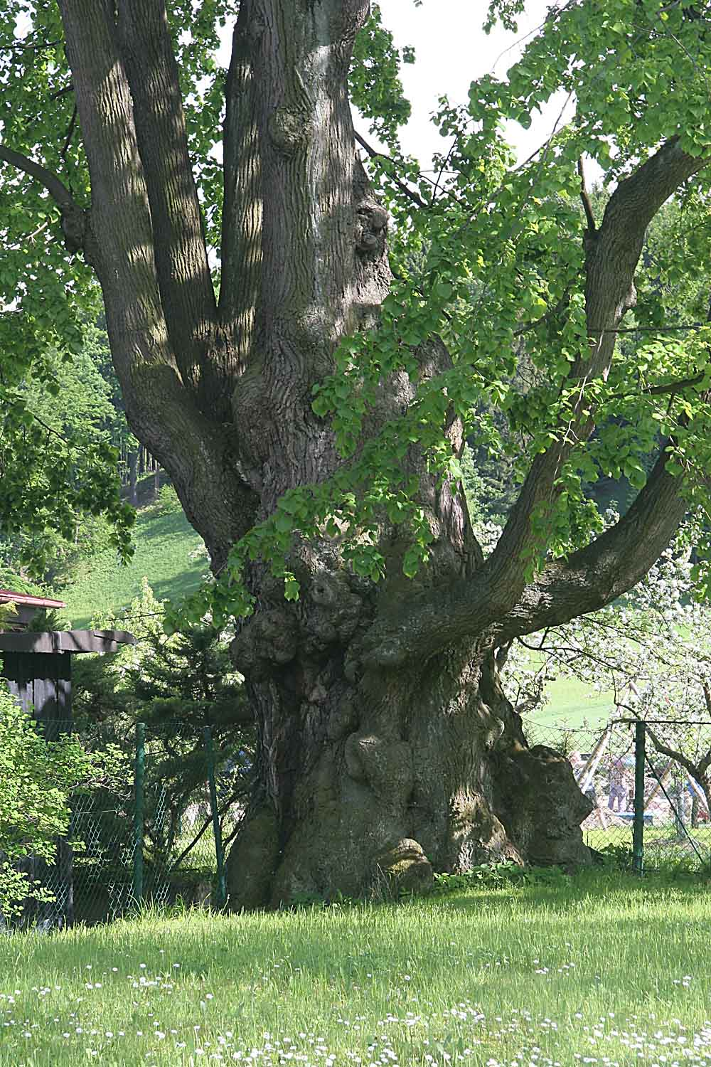 Památná Šrůtkova lípa v Machově